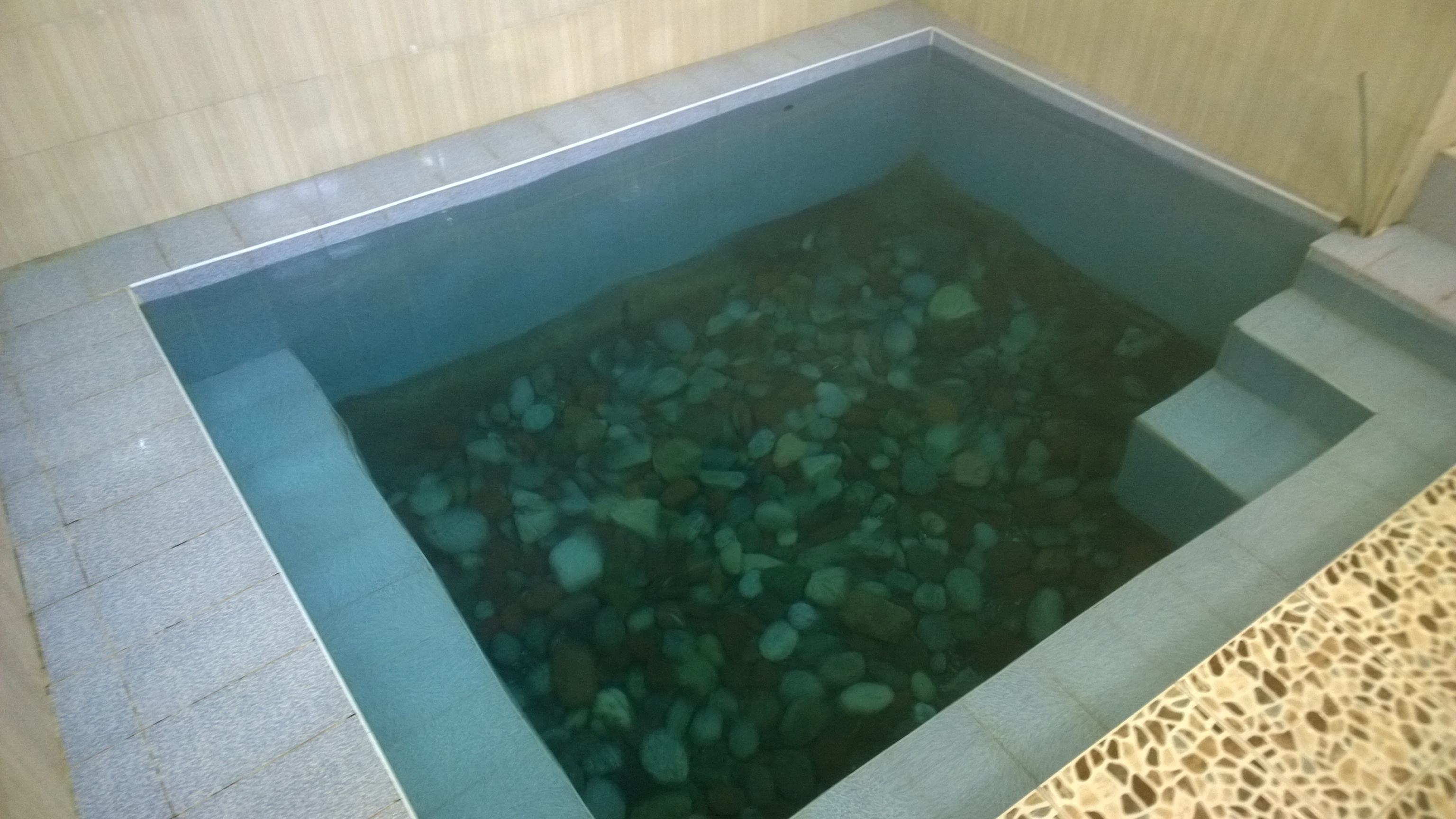 Тоҷикӣ: Яке аз ҳавзҳои Гармобаи Мулошайх